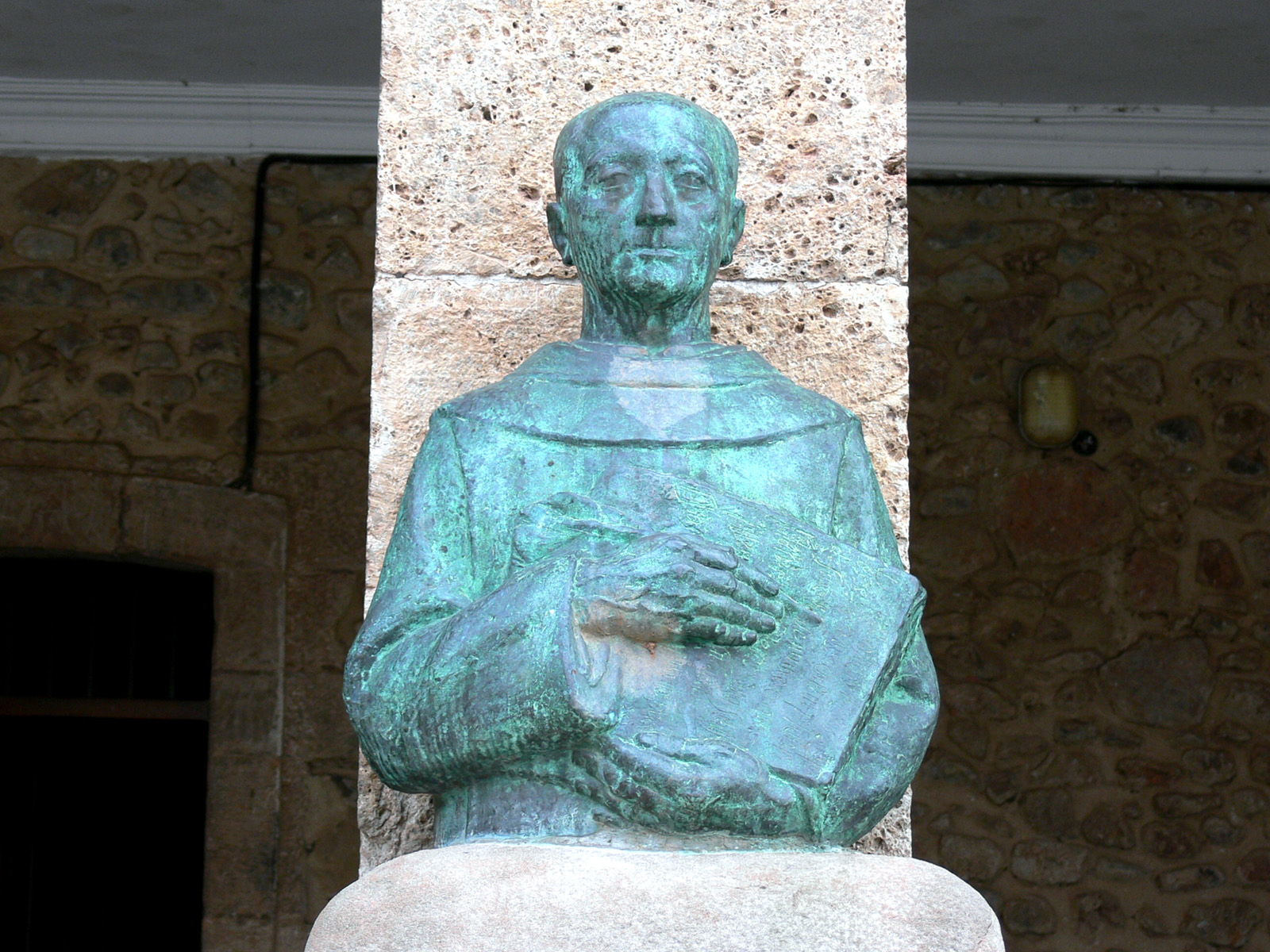 Gonzalo de Berceo. Berceo, La Rioja, España.